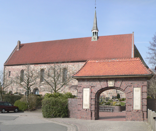 Die St. Sixtus- und Sinicius-Kirche in Hohenkirchen, dem Heiligen Sixtus von Reims und seinem Gefährten Sinicius geweiht